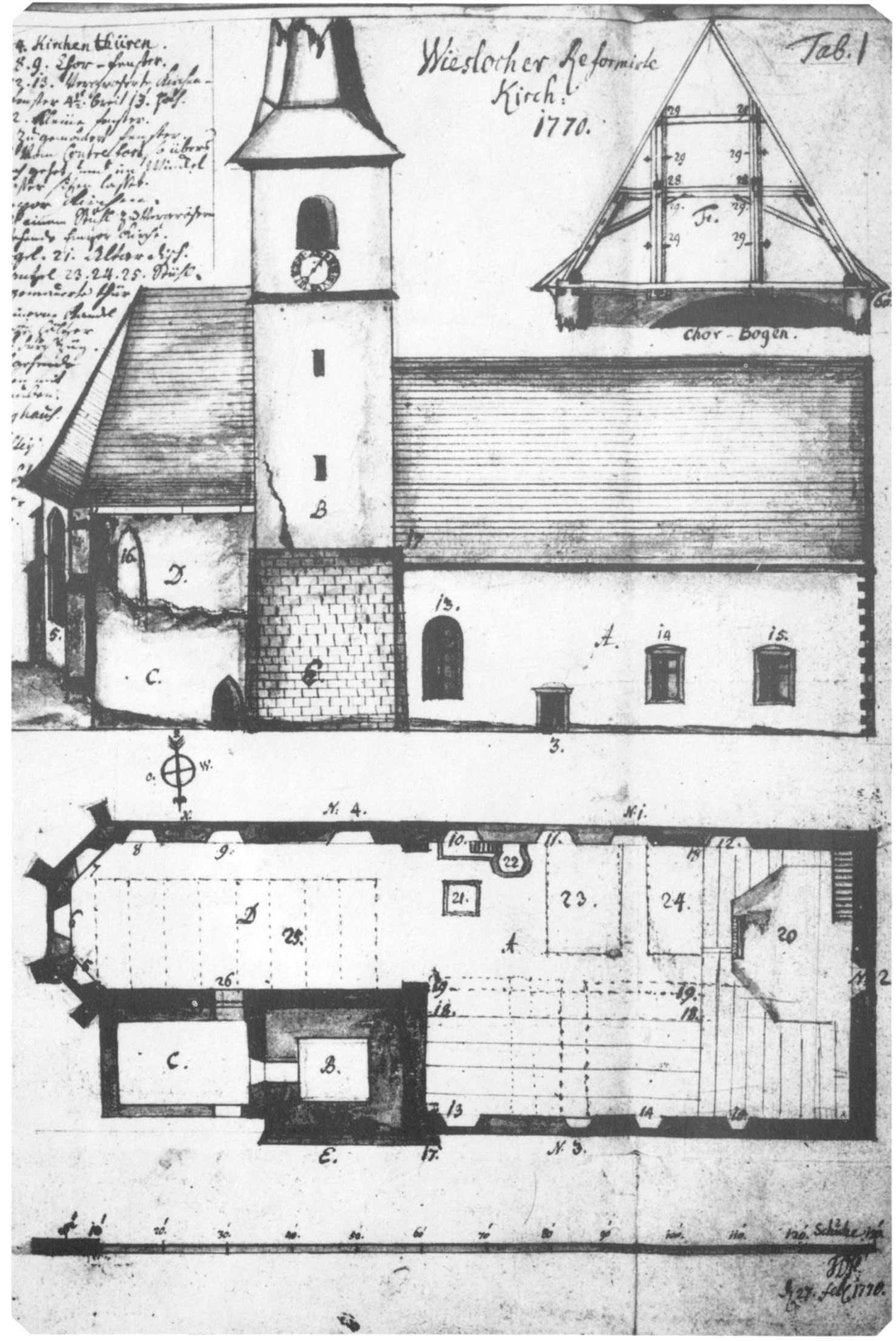 Plan der Stadtkirche Wiesloch vom 27. Februar 1770